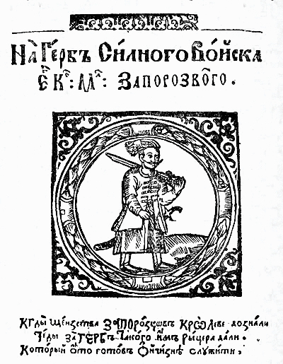 Печатка ВЗ часів Сагайдачного